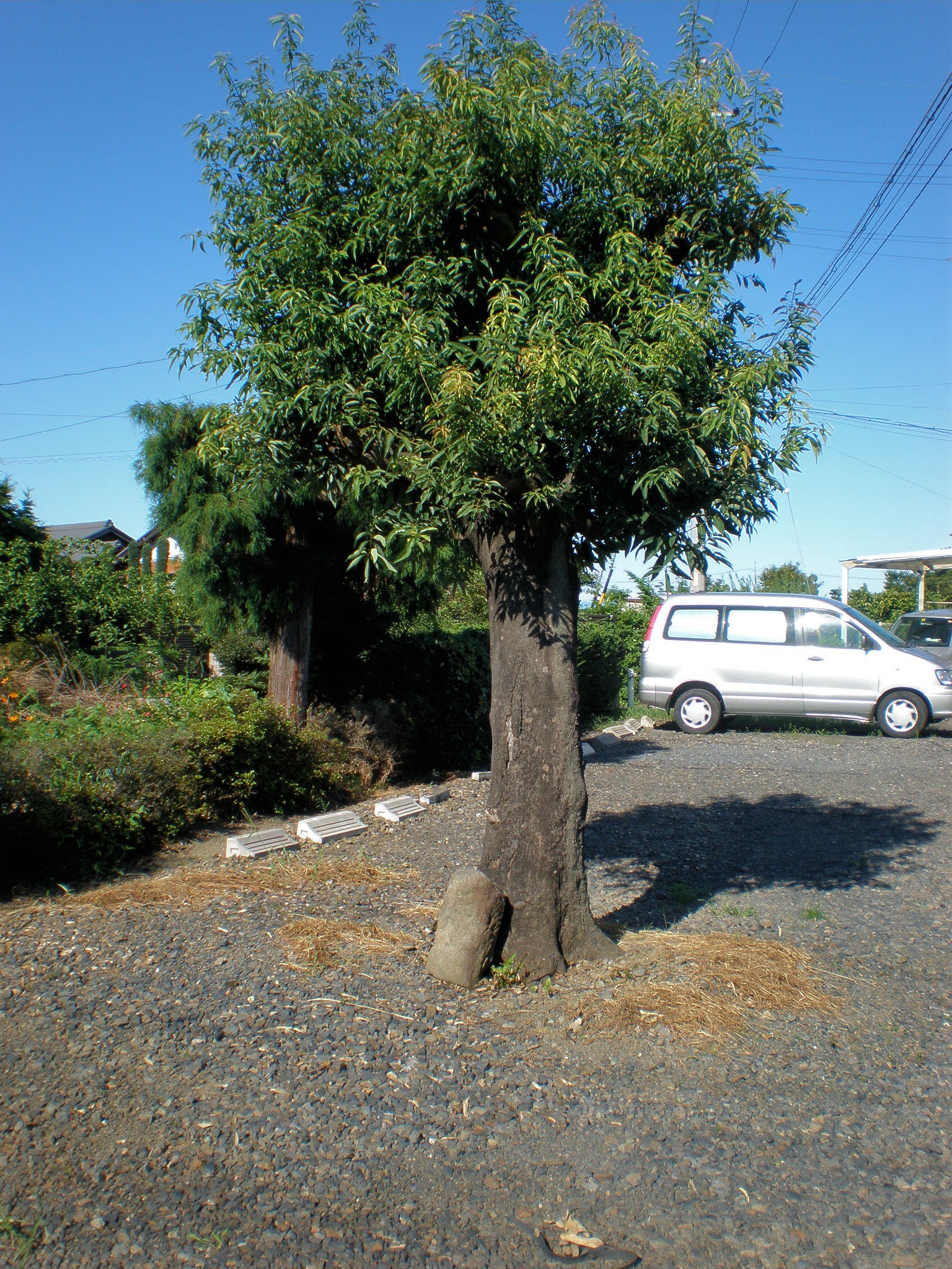 愛知県春日井市にある田楽砦跡